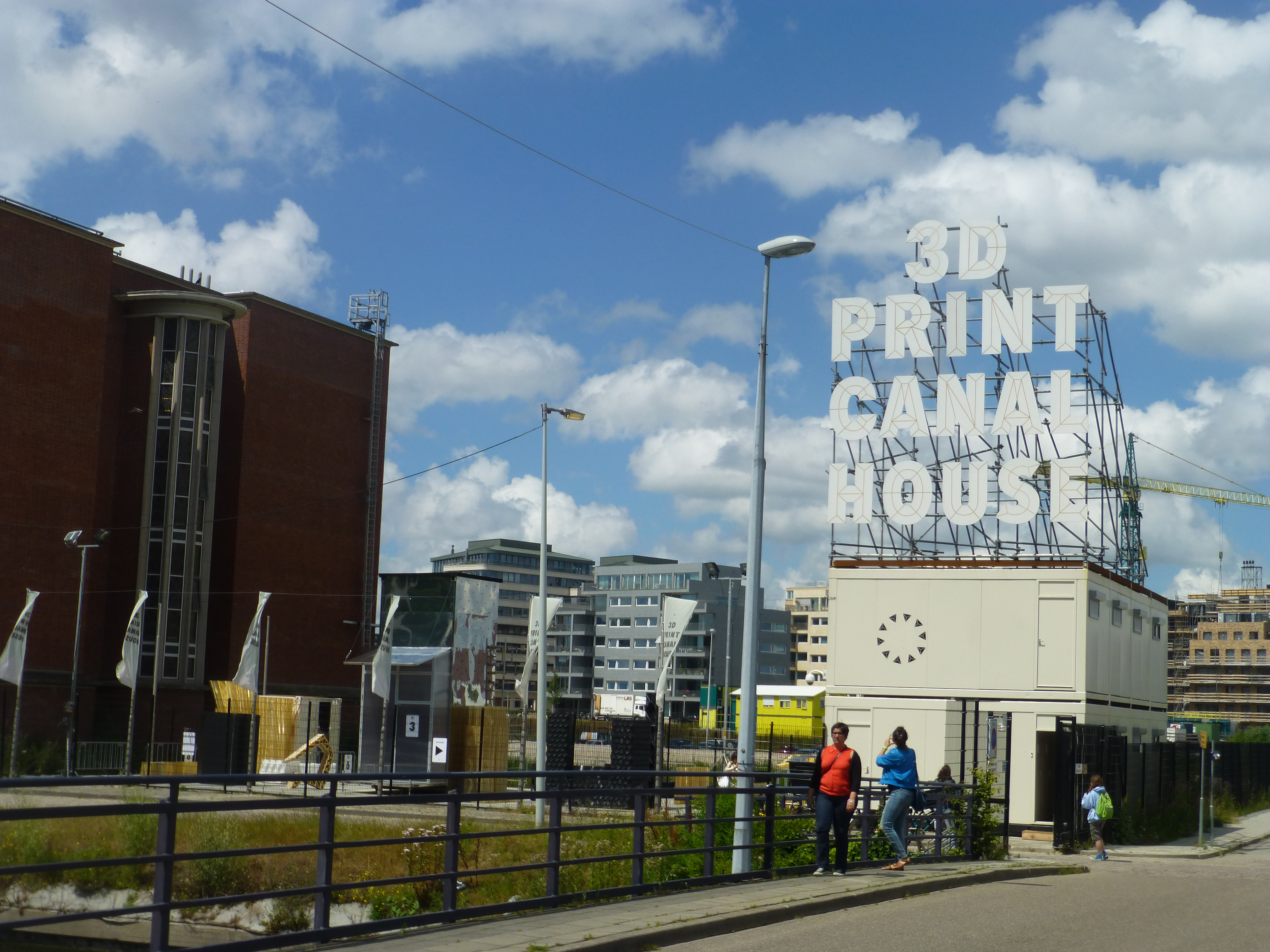 Prima casa del canale ad Amsterdam costruita con una stampante 3d apposite (Asterweg)